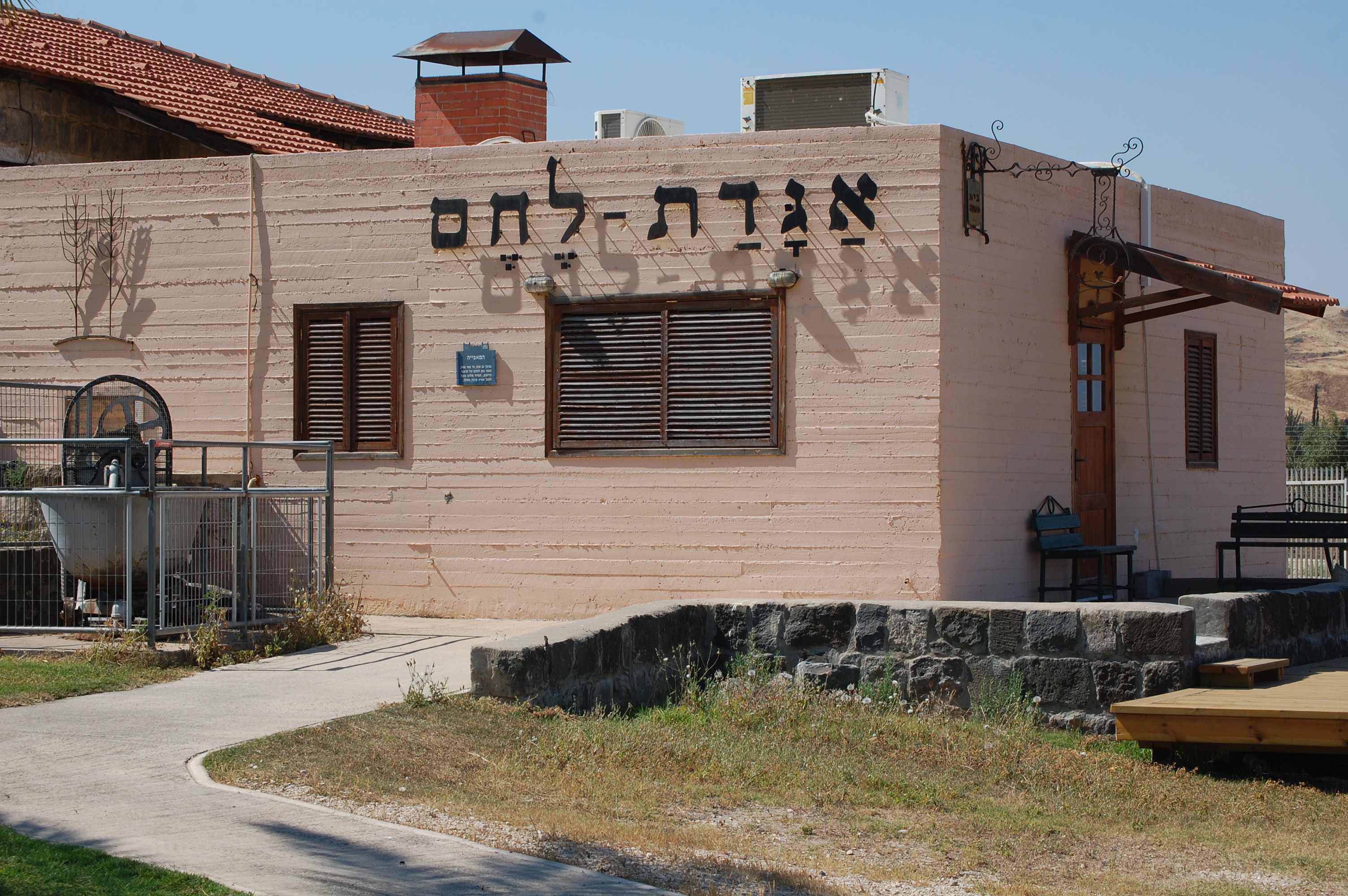 גשר הישנה ונהריים